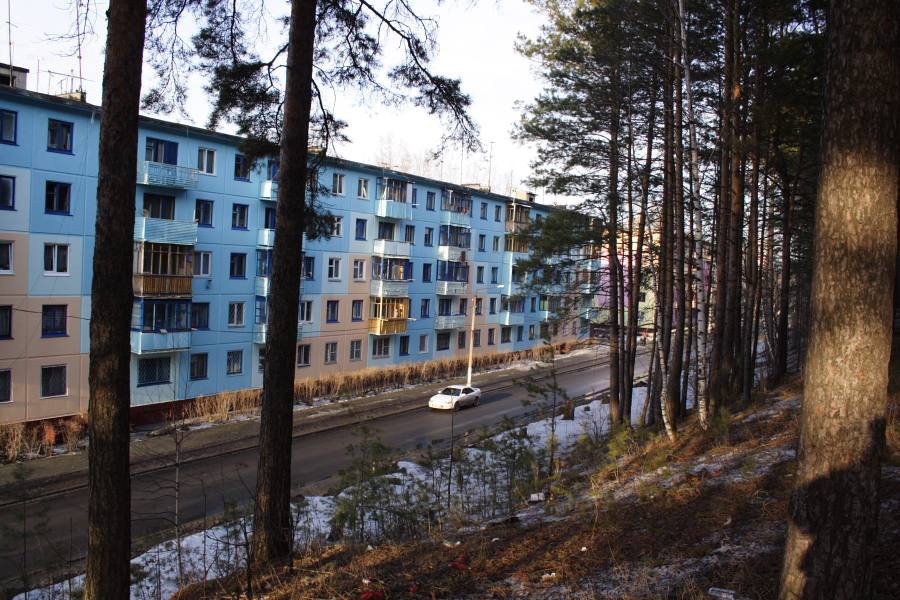 Улица Радищева в Бийске. Вид из лесопарковой зоны квартала АБ.